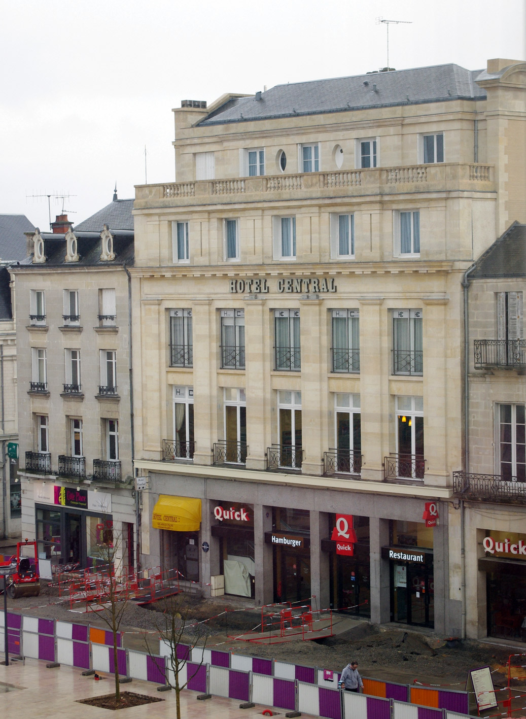 Hôtel Central, place du Maréchal-Leclerc, Poitiers. Anciennement café du Jet d'Eau, bâtiment construit par André Ursault en 1932.